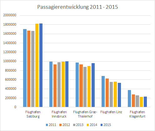 Passagierzahlen der Flughäfen Salzburg, Innsbruck, Graz, Linz und Klagenfurt von 2011 - 2015